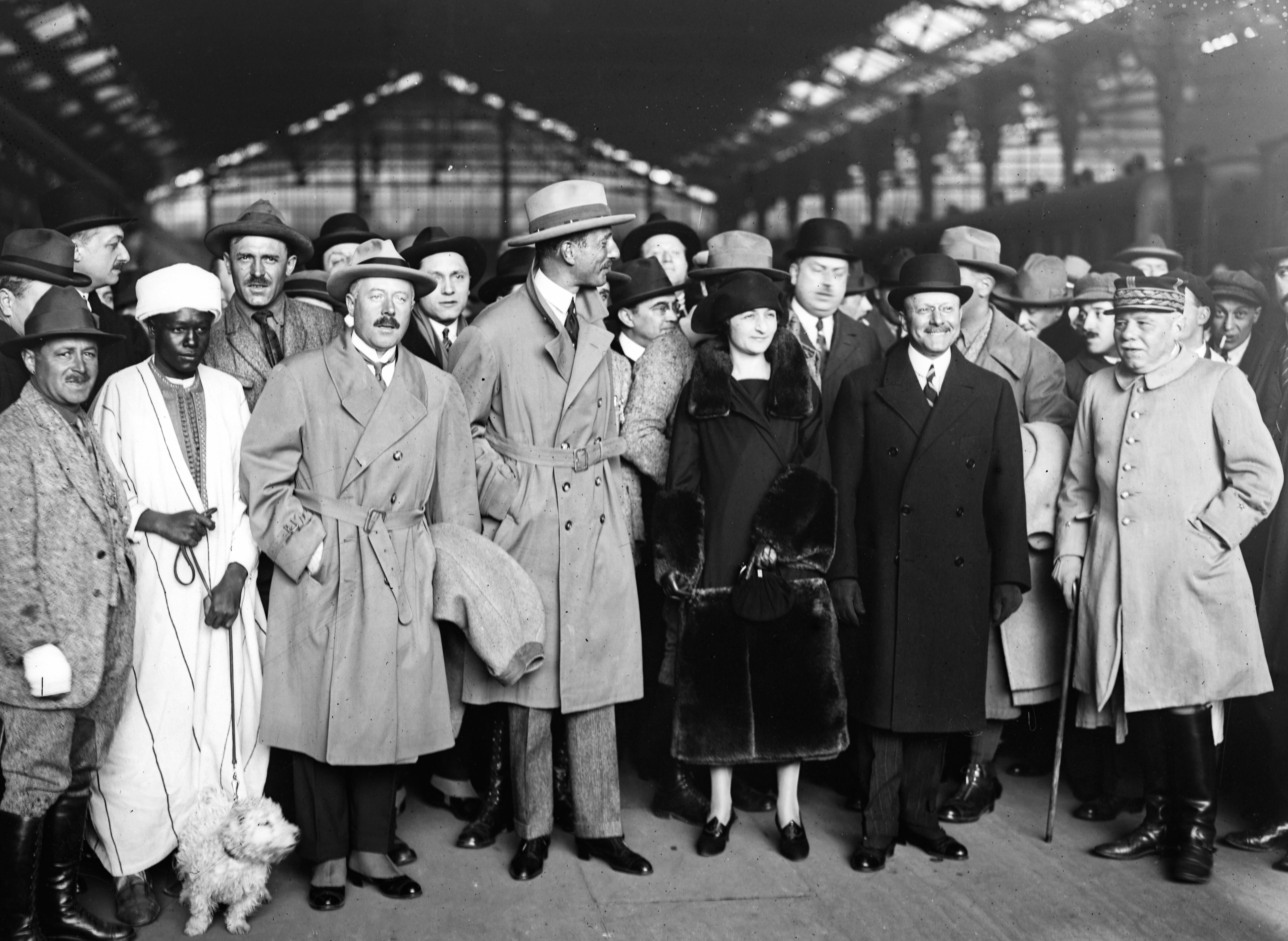 En imperméable fermé, de gauche à droite : Louis Audouin-Dubreuil et Georges-Marie Haardt. En veste et chapeau noir : André Citroën et sa femme. A droite, avec une canne, le général Estienne. Photographie prise en mars 1923 à la gare de Lyon au retour de la première traversée du Sahara en automobile. Détail d'un négatif sur plaque de verre, 13 X 18 cm.